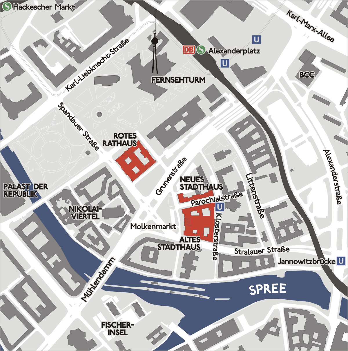 Lage des Stadthauses in Berlin-Mitte, Deutschland Reference: maps